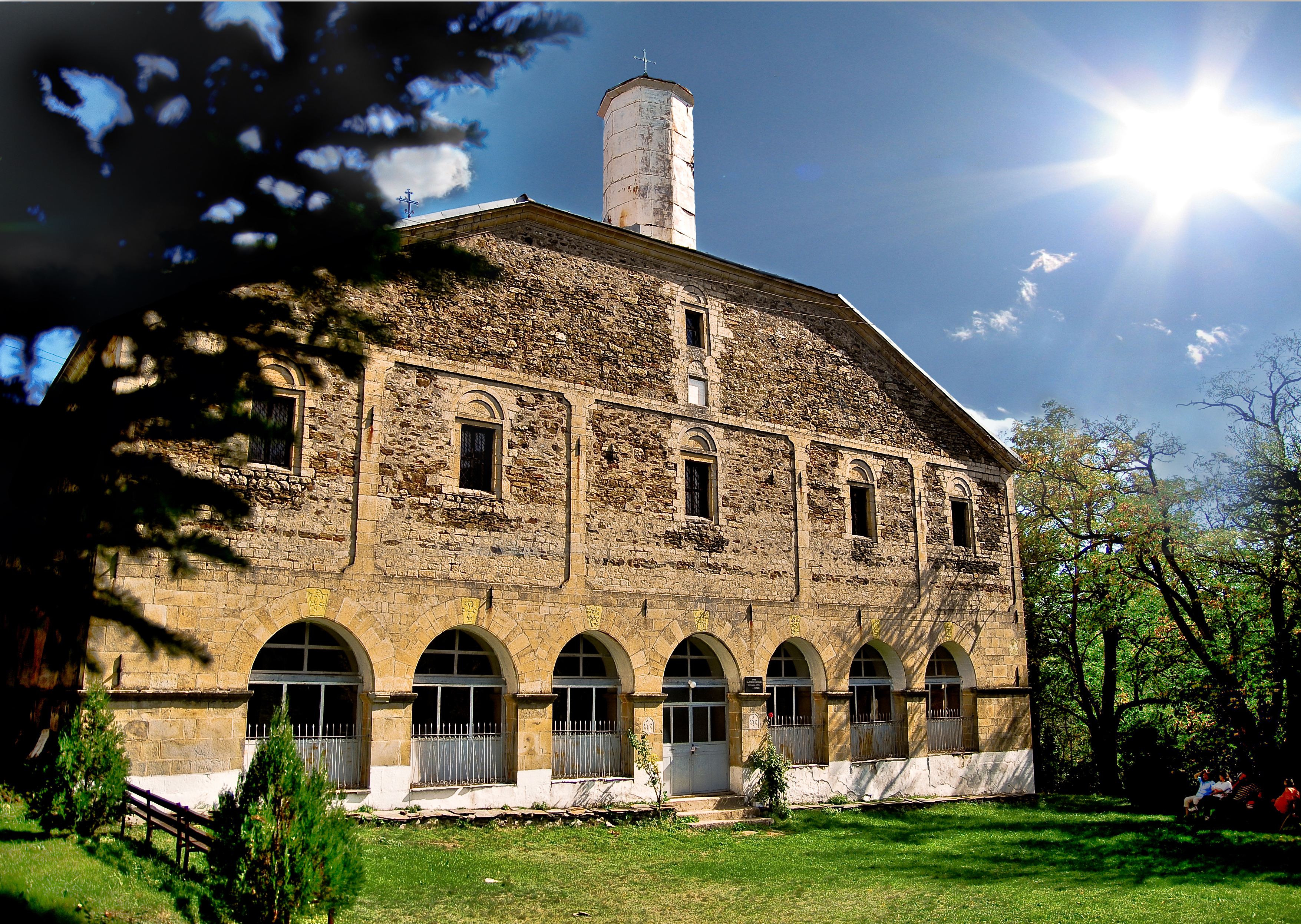 Црква во Гопеш